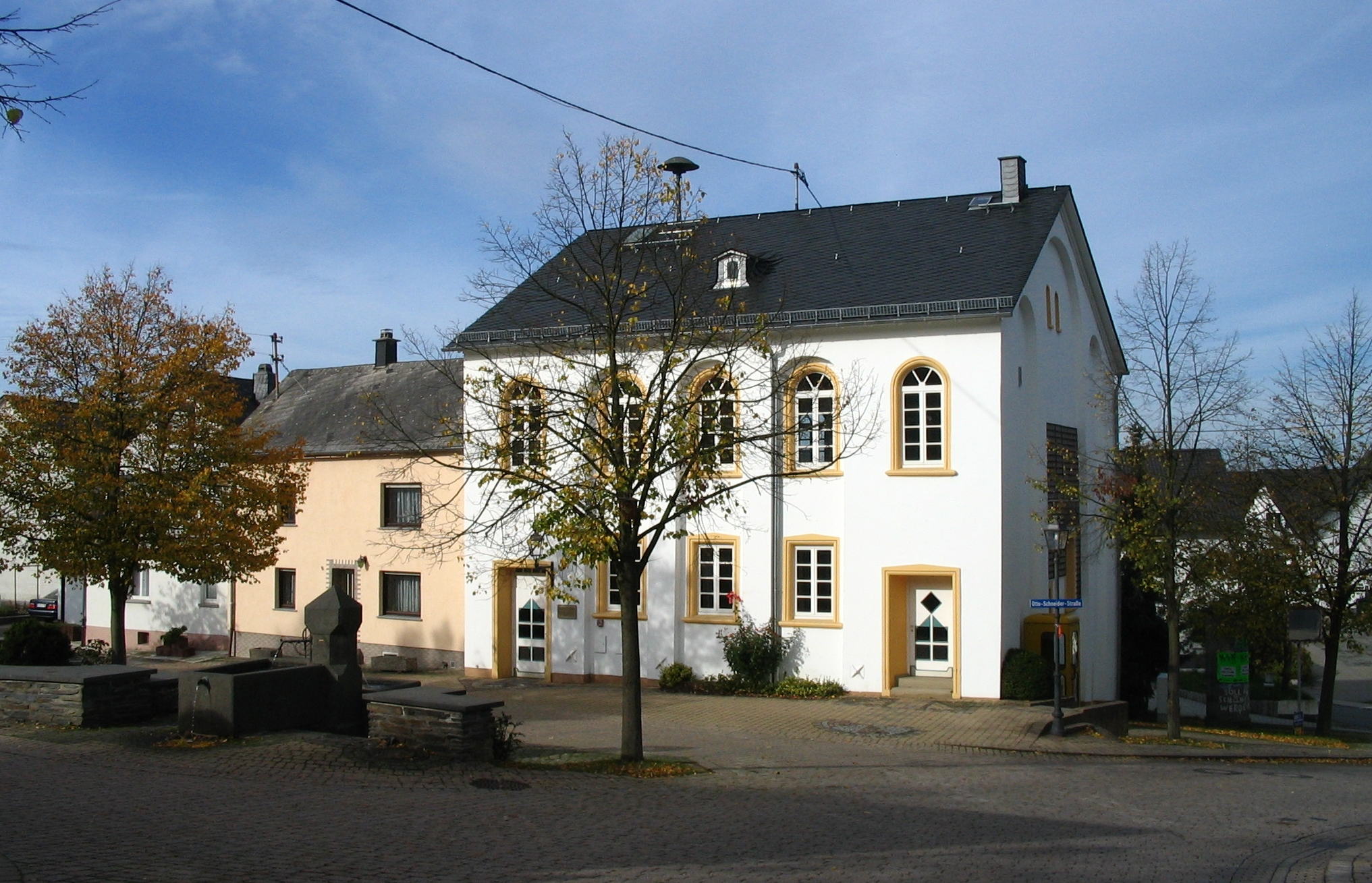 Gemeindehaus Mutterschied/Hunsrück